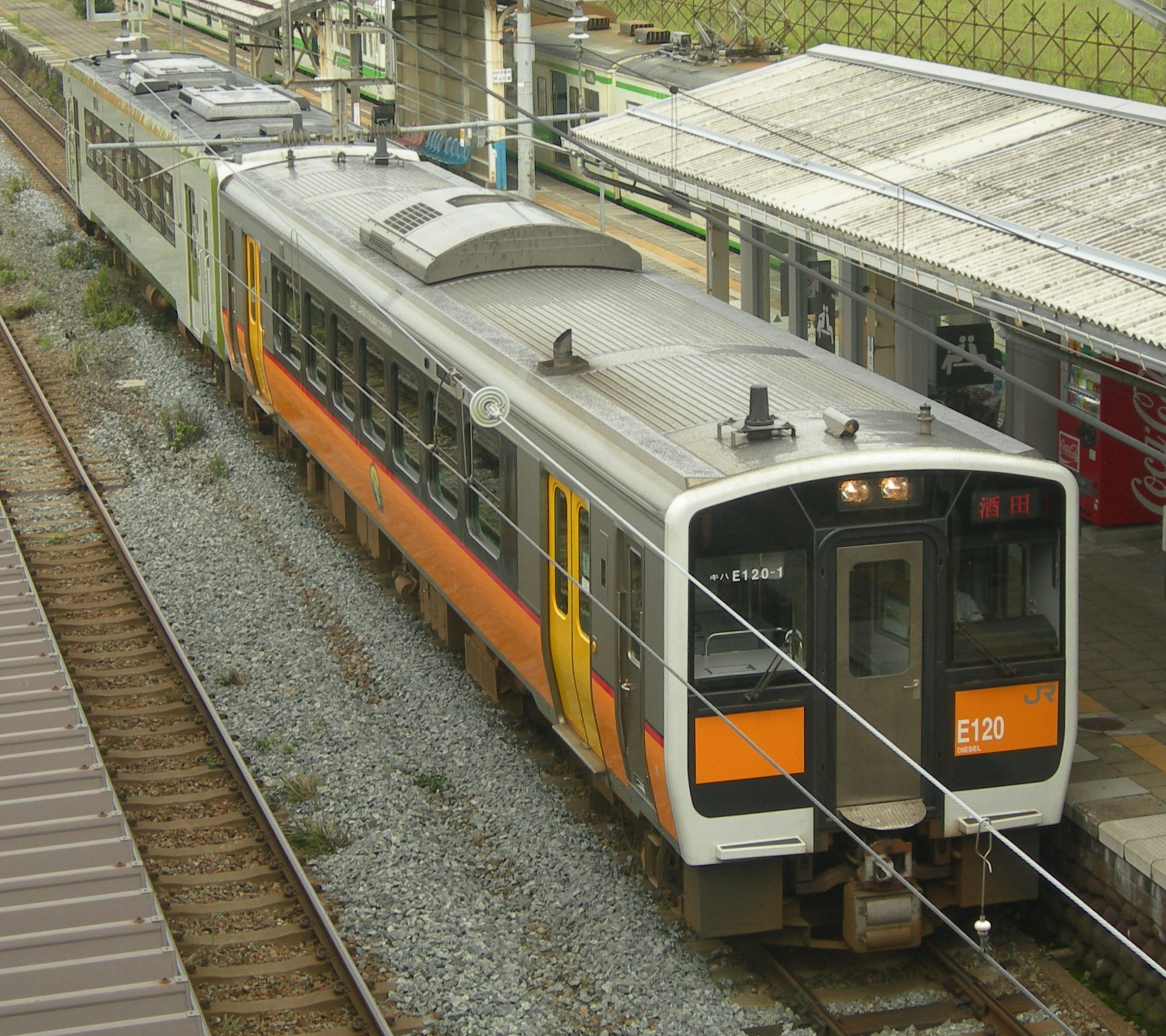 キハE120形気動車とキハ110系気動車。坂町駅にて。Nikon Coolpix 7600